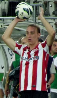 Adam Marciniak, piłkarz Cracovii Kraków.